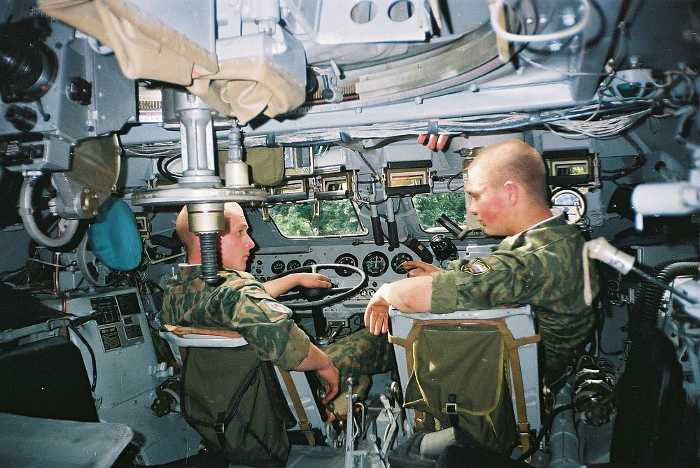 Wnętrze transportera opancorzengo BTR-60. Moskwa w czasie pokazów uzbrojenia, czerwiec 1996 r.